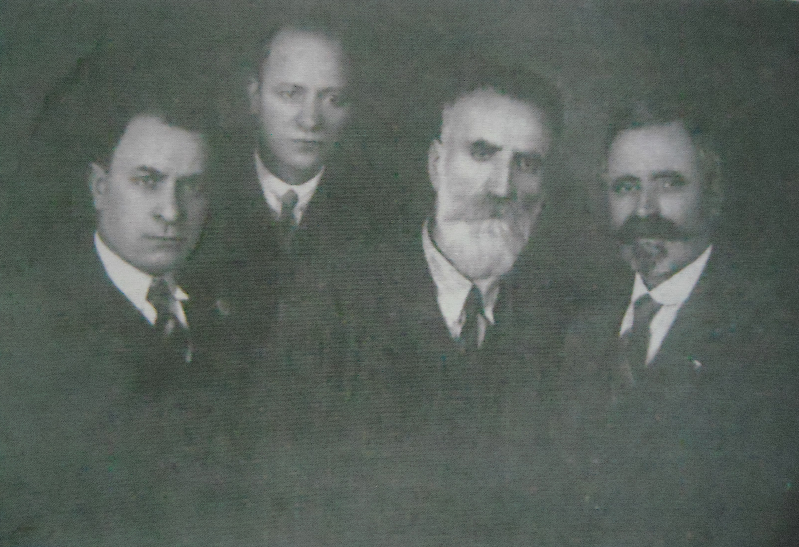 Ilinden organisation members